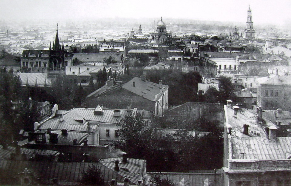 Old picture View to Kharkov from Mironositskaya Church. Вид с новой высокой, 1911 года, колокольни Мироносицкой церкви на центр Харькова, между улицами Гоголя (слева) и Сумской (справа, не видна). Слева направо церкви: католический костёл, Троицкий собор на Подоле, †Николаевский собор, Покровский собор, колокольня Успенского собора. †Лютеранская колокольня (1914) слева на Пушкинской ещё не построена, †Воскресенская церковь[1] напротив Рыбного моста не видна. Подпись под фото: "Вид с колокольни Мироносицкой церкви. Фотограф-любитель Борис Кузьмич Руднев, побывав на колокольне Мироносицкой церкви, сделал целый ряд фотографий Харькова. Несмотря на то, что снимок сделан любителем, он представляет интерес для восстановления картины старого города. На фотографии видны Николаевская и Троицкая церкви, Успенский собор и костел"